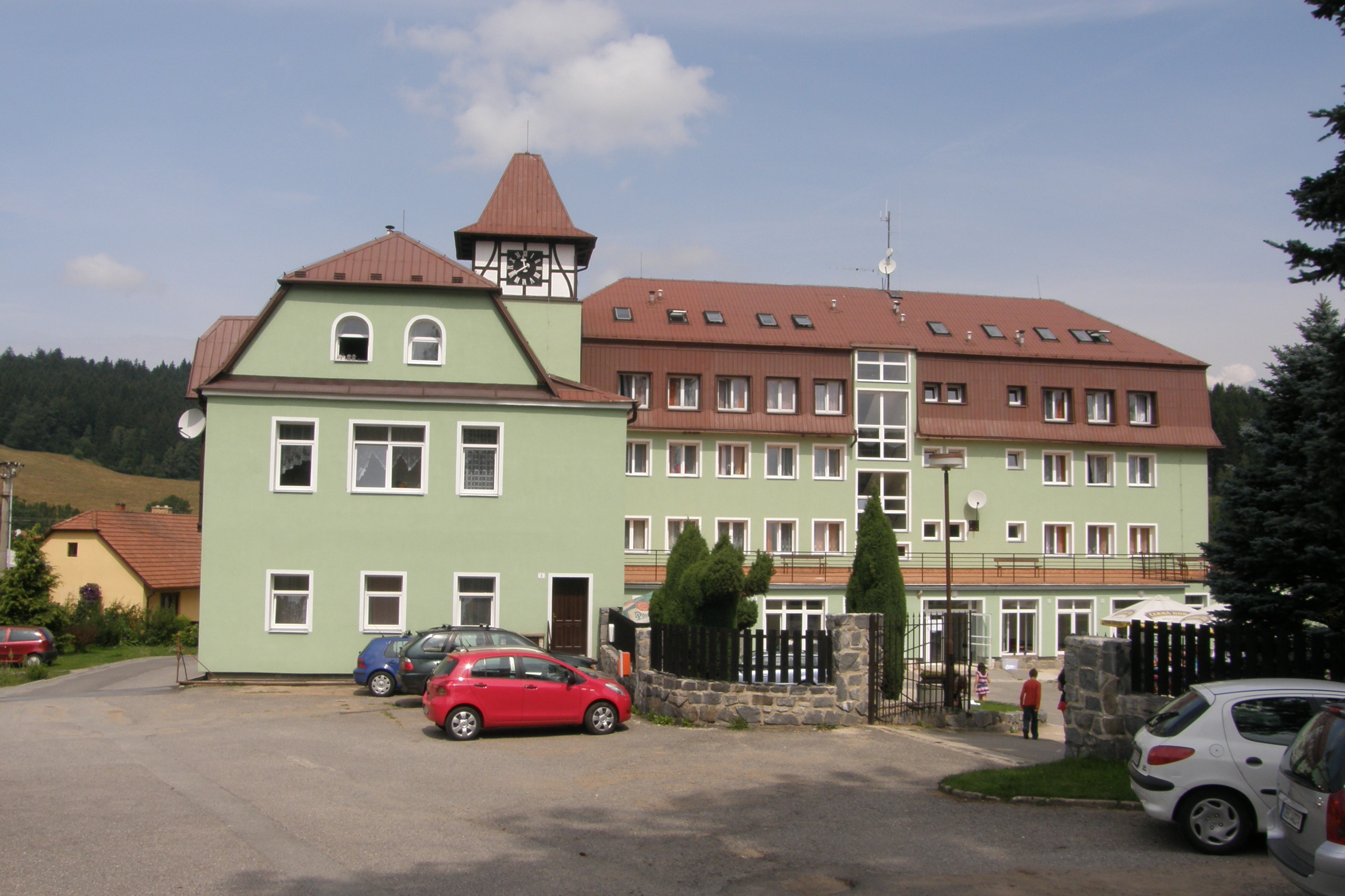 Zámeček v Hodoníně u Kunštátu